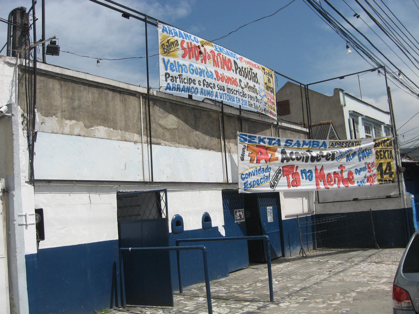 Escola de samba Arranco do Engenho de Dentro, do Rio de Janeiro.